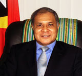 Vicente da Silva Guterres, Abgeordneter aus Osttimor